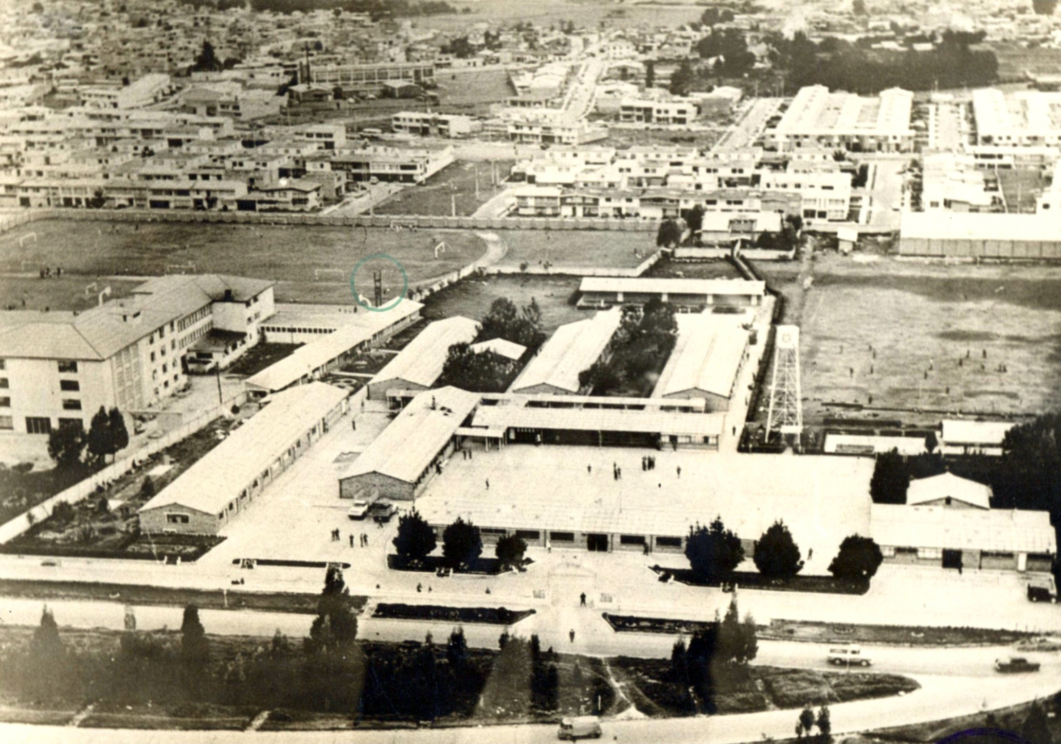 Escuela de Suboficiales y Nivel Ejecutivo, Gonzalo Jimenez de Quesada